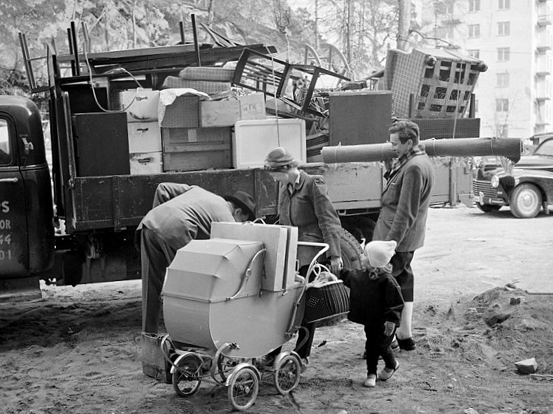 Larsboda. En familj flyttar in i det nybyggda området, Stockholms sydligaste stadsdel